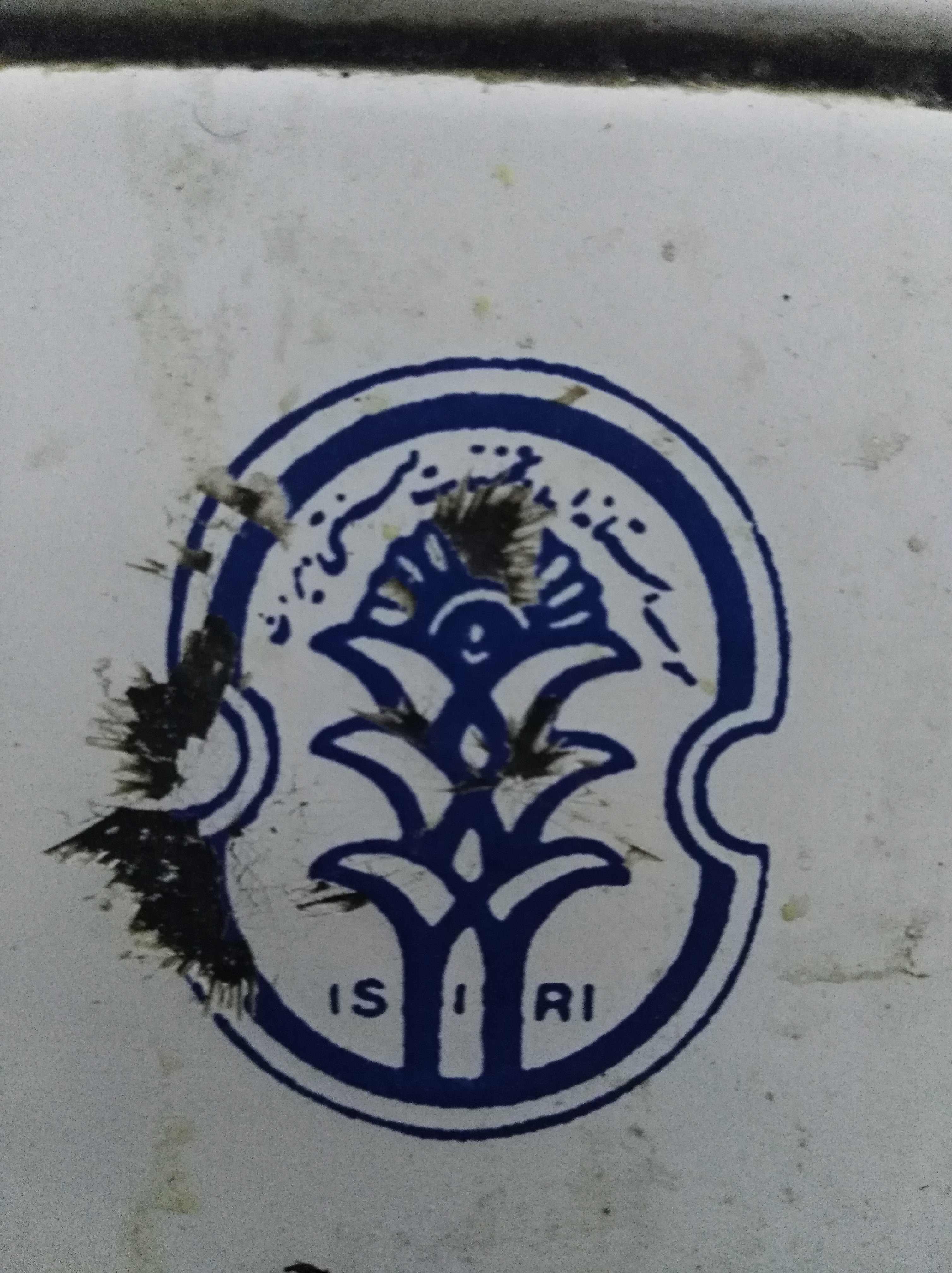 نماد قدیمی سازمان که جایگزین شد